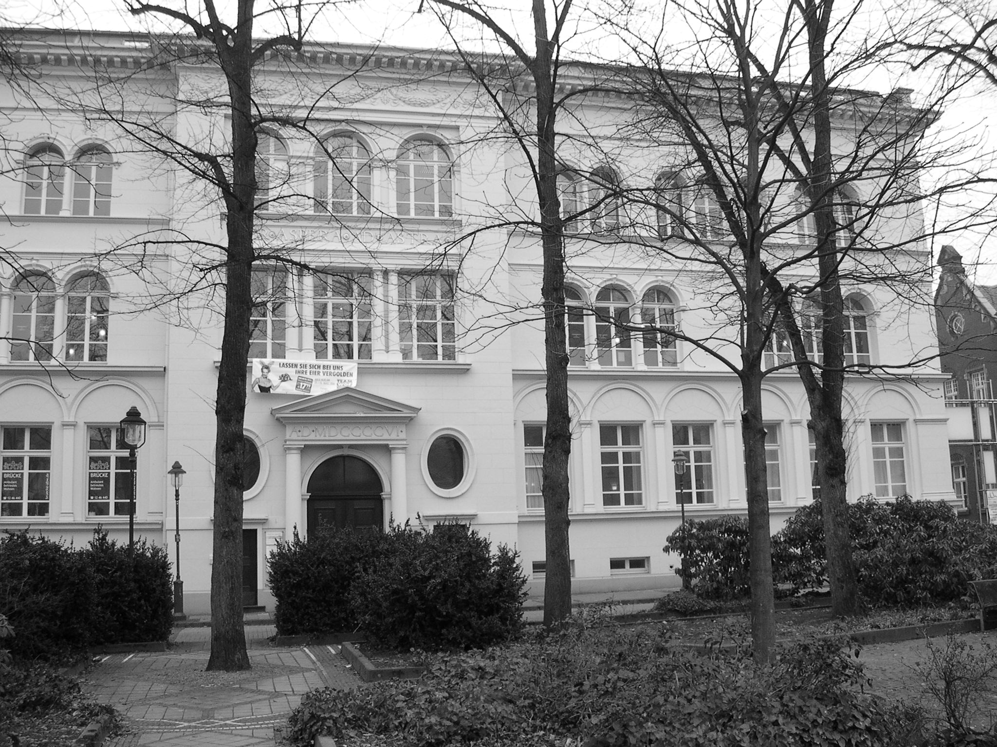 Stolberg, ehemaliges Goethegymnasium am Kaiserplatz